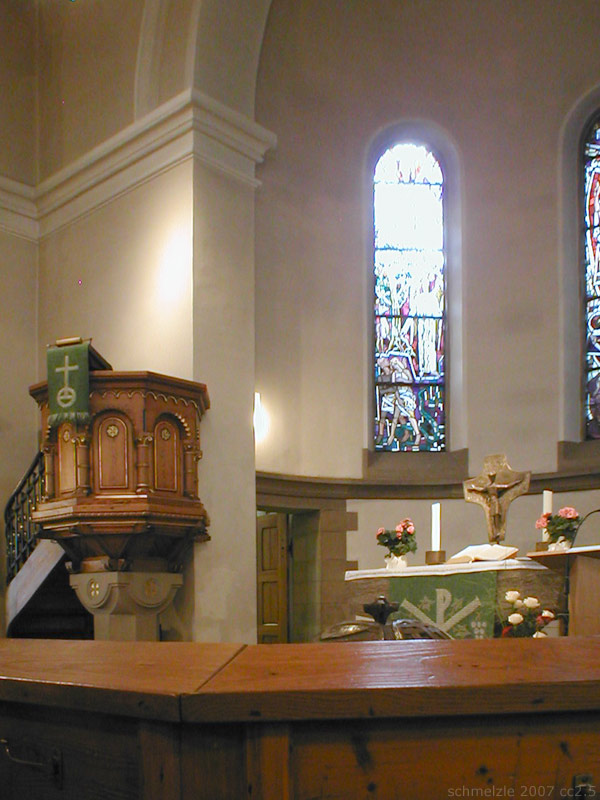 Blick in den Altarraum der evang. Matthäuskirche in Heilbronn-Sontheim, Baden-Württemberg, Deutschland